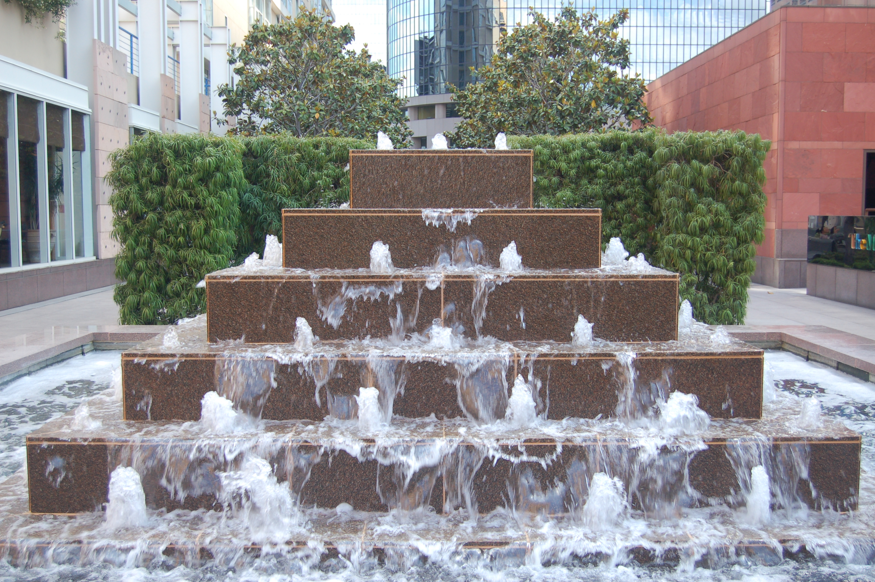 Fountain @ MOCA